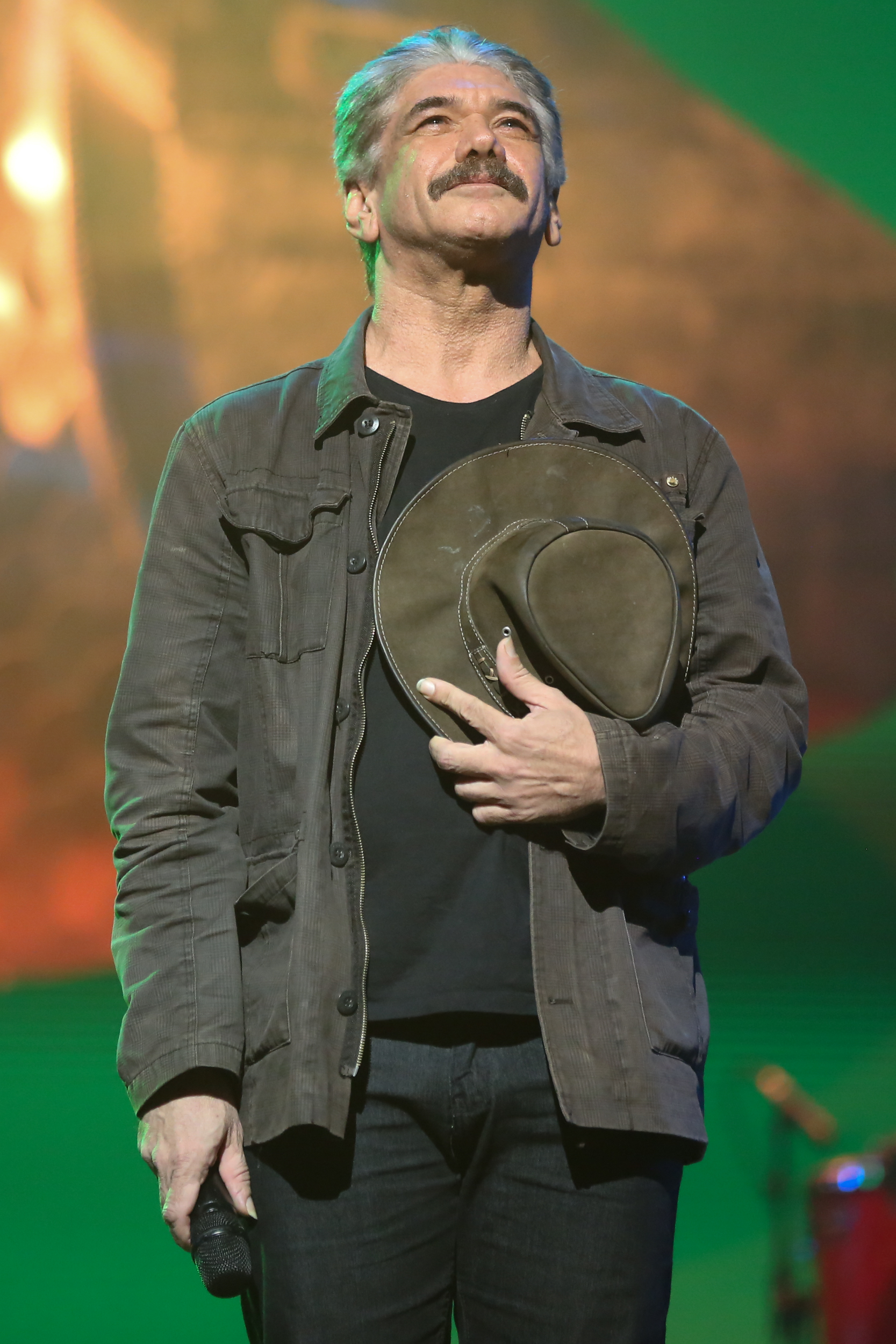 Jackson Antunes - 26° Prêmio da Música Brasileira 2015, no Theatro Municipal, no Centro do Rio de Janeiro/RJ. (10/06/15) Foto: Roberto Filho/Divulgacão